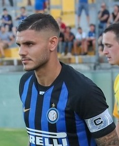 21.07.2018. Италия, Пиза. Третий «Газпром» — тренировочный сбор: товарищеский матч «Интер» — «Зенит».